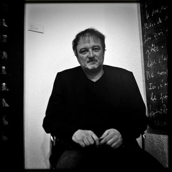 Denis Robert, auteur et journaliste, en juin 2011.